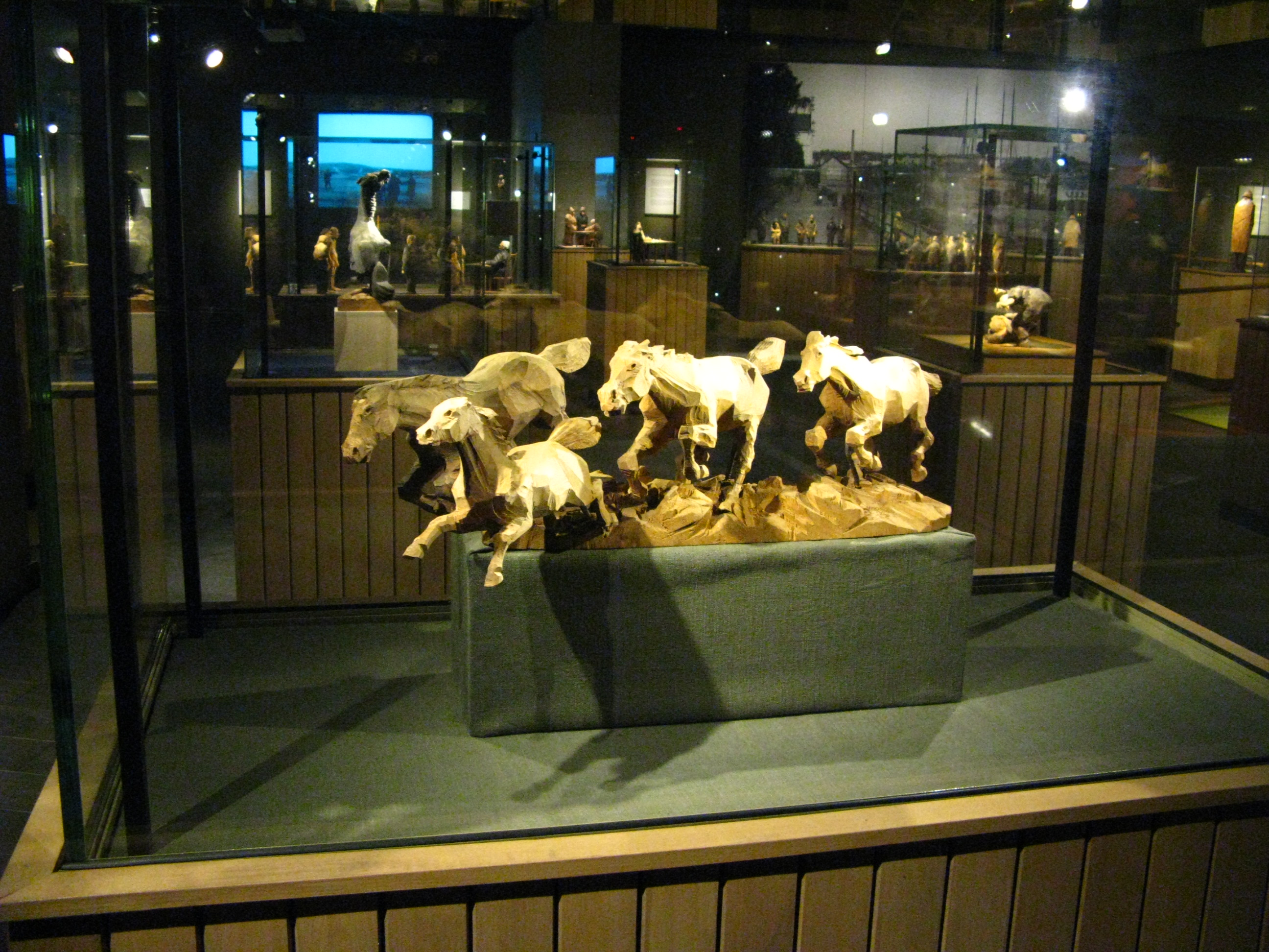 Axel Petersson "Döderhultarns" verk Apokalypsen. Döderhultarmuseet i Oskarshamn.